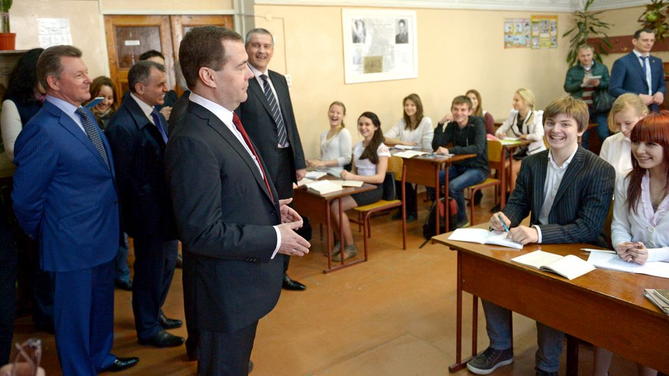 Дмитрий Медведев в Симферопольской гимназии №1 имени К.Д. Ушинского.